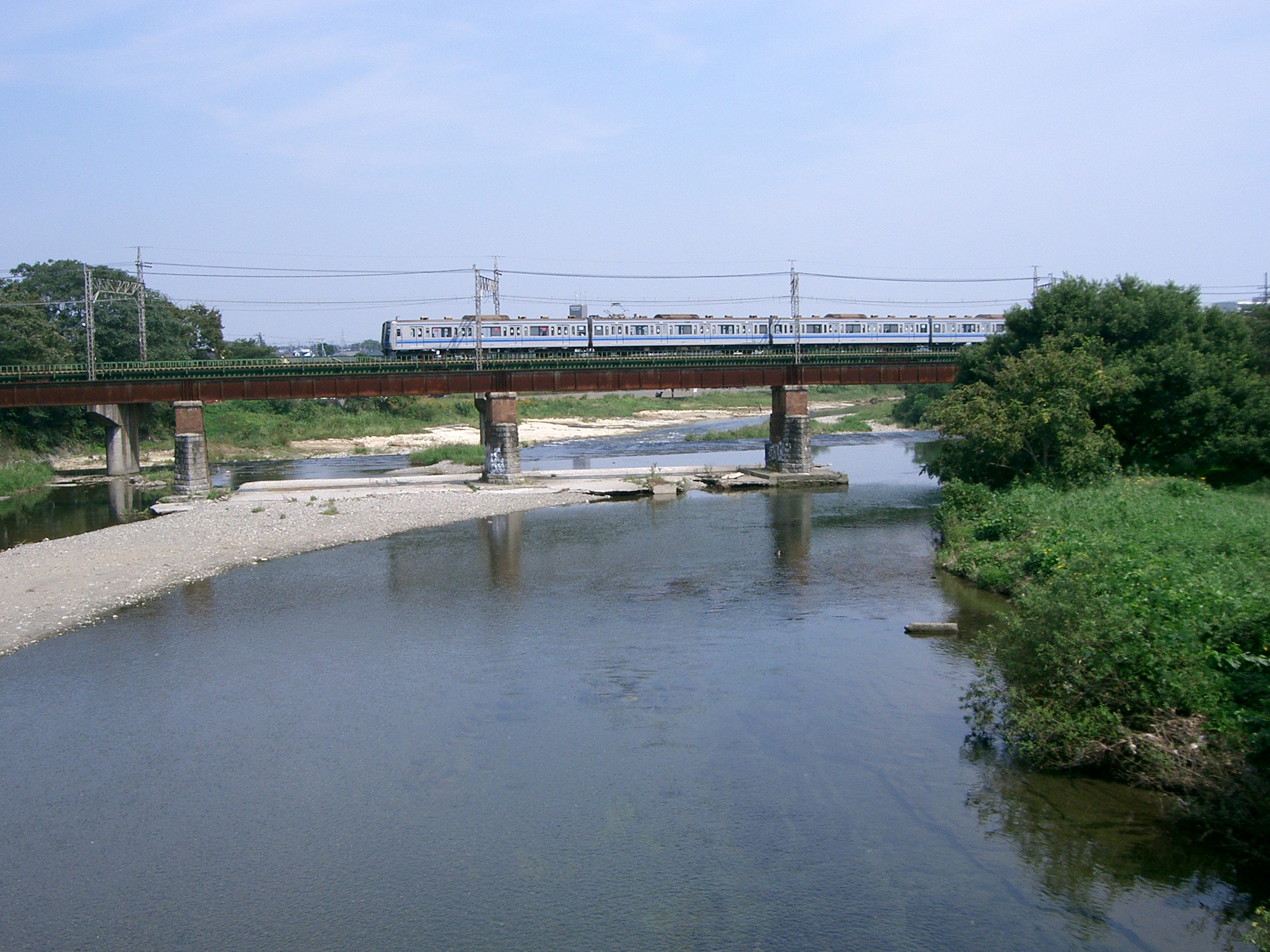 Iruma river (入間川 irumagawa) in Saitama, Japan.